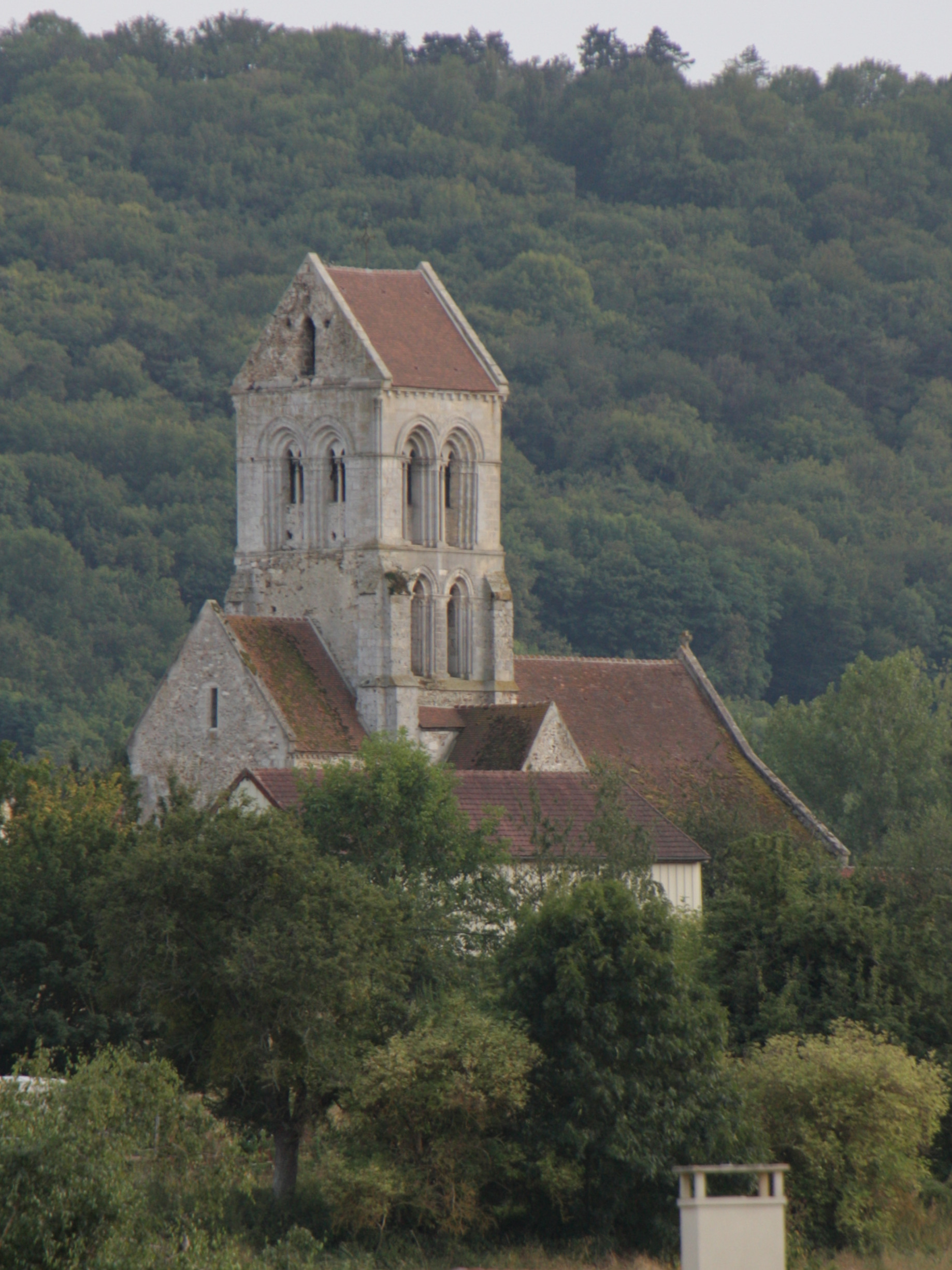 L'église Saint-Georges de Fossy, vue depuis la vallée de la Marne. .